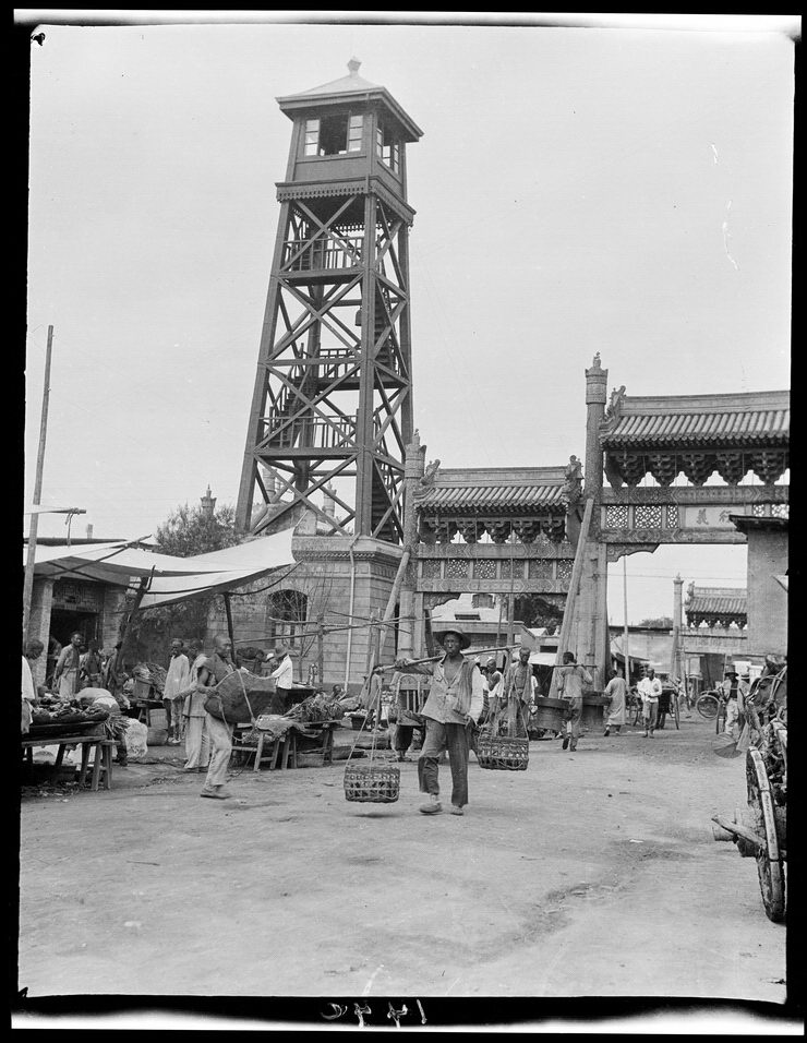 照片摄于1910年代。照片中，牌楼旁耸立的方塔， 就是老北京城的消防瞭望塔，又称为望火楼。楼顶有专人日夜轮值，一旦发现灾情，立即通过敲钟报警的形式，指令救火队员前去扑救。这简朴的望火楼，一度在城市防火减灾上发挥着关键性作用。